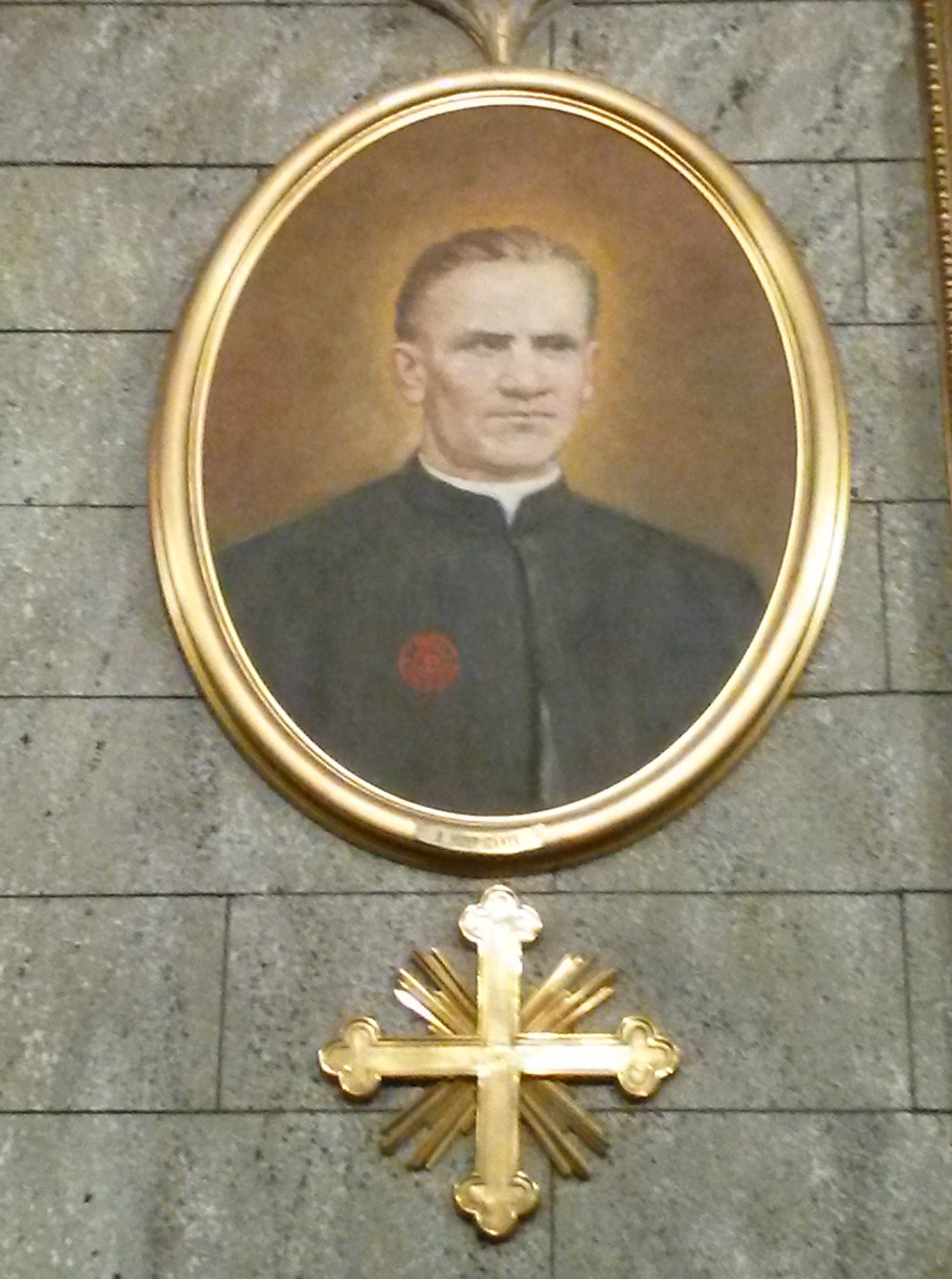 Cuadro del beato José Stanek que se venera en la Iglesia de San Salvatore in Onda, Roma.